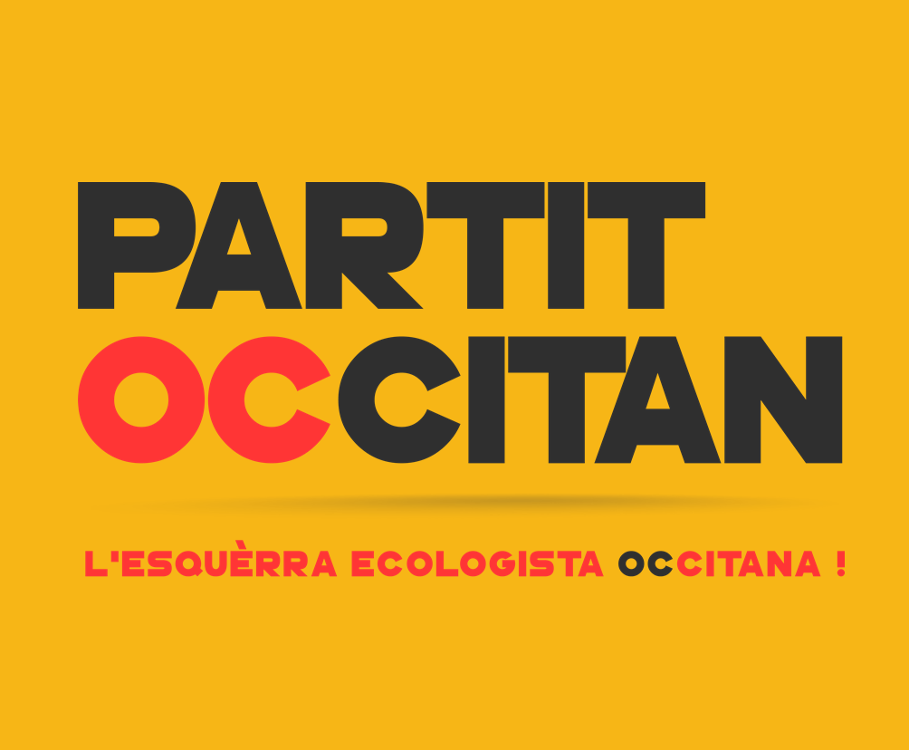 Lògo del Partit Occitan, 2015.